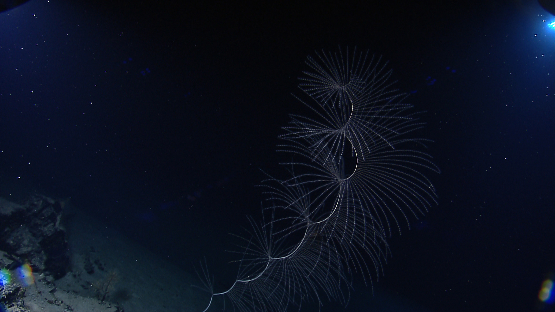 Iridogorgia sp. NOAA Okeanos Explorer Program, Mid-Cayman Rise Expedición 2011